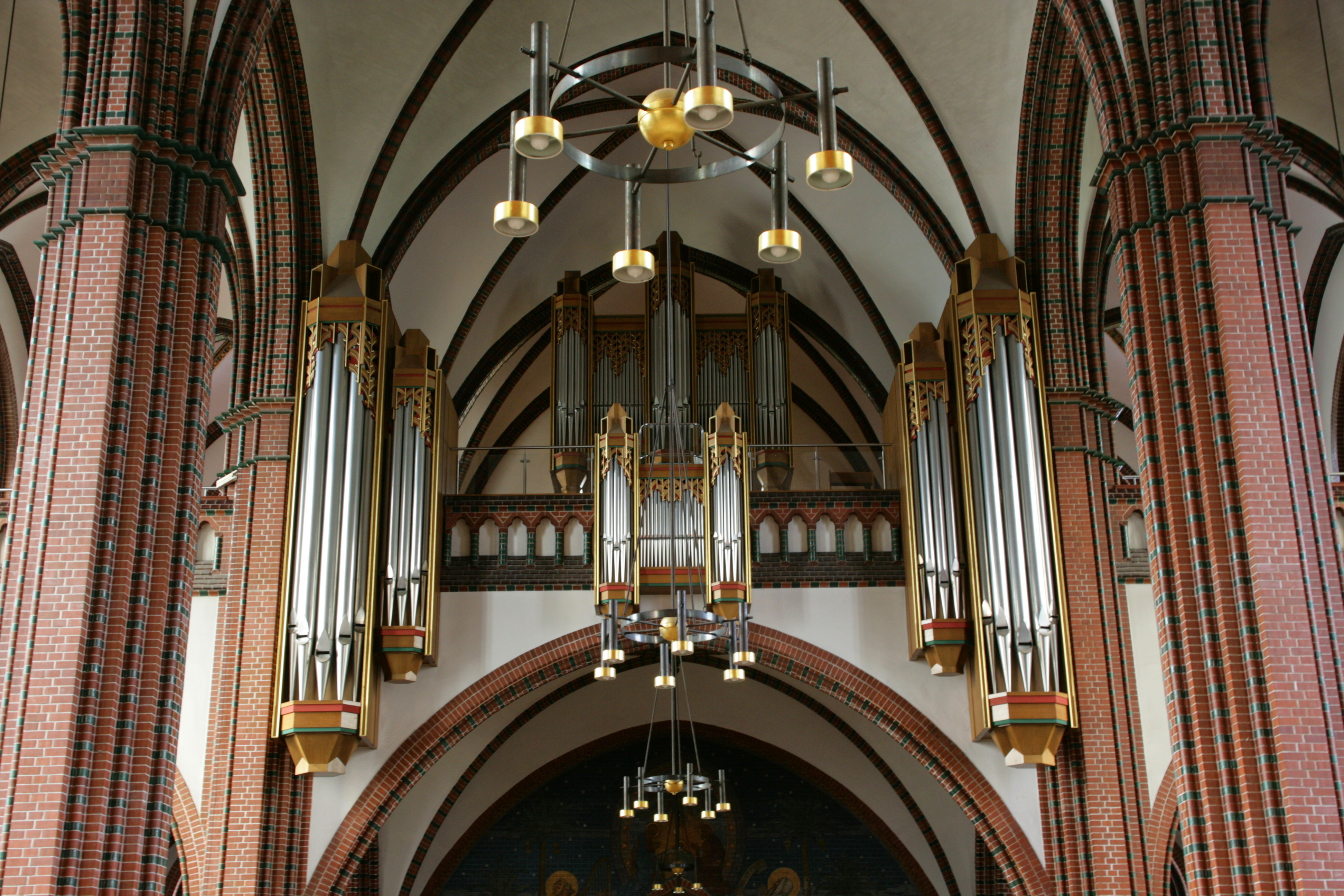 Jakobuskathedrale, An der Jakobuskirche in Görlitz